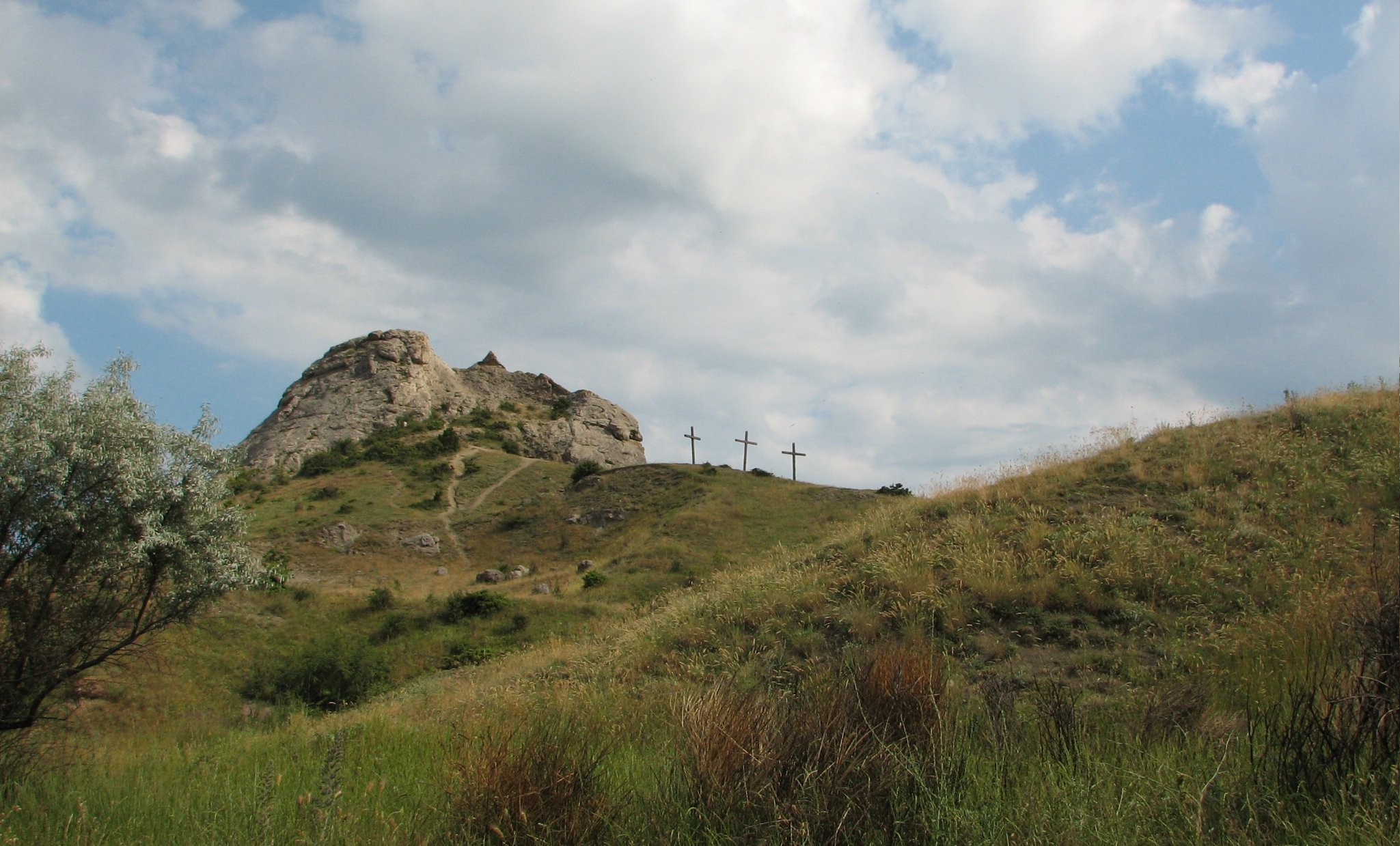 Гора Сахарная голова в городе Судаке. Кресты остались после съёмок сериала Мастер и Маргарита (сцена на "Голгофе")